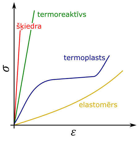 Deformācijas diagrammu raksturs dažādām polimēru grupām.